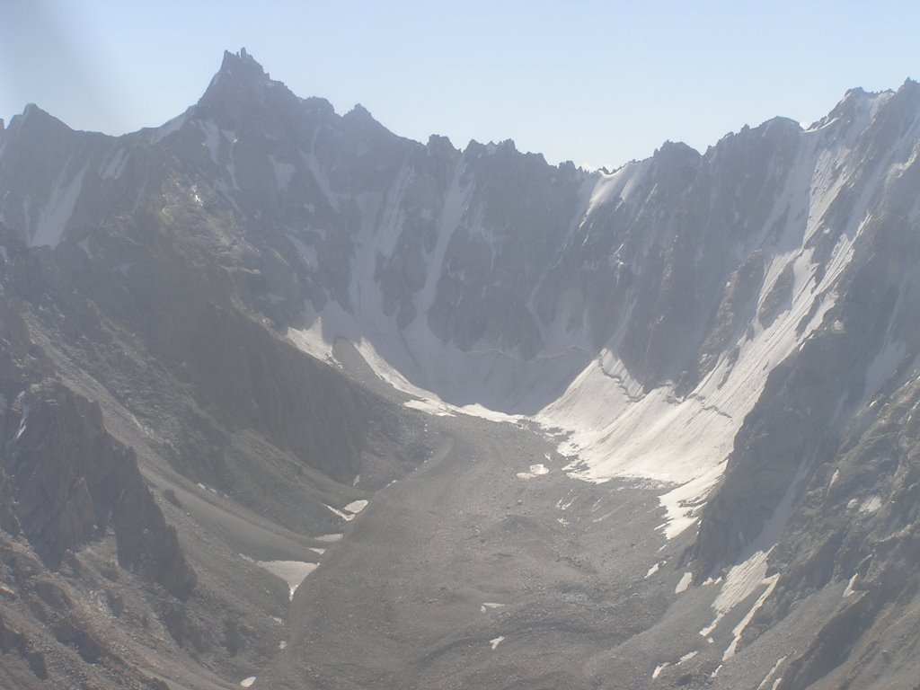 کوه سفیدخرس یکی از کوه های استان بدخشان در منطقه درواز